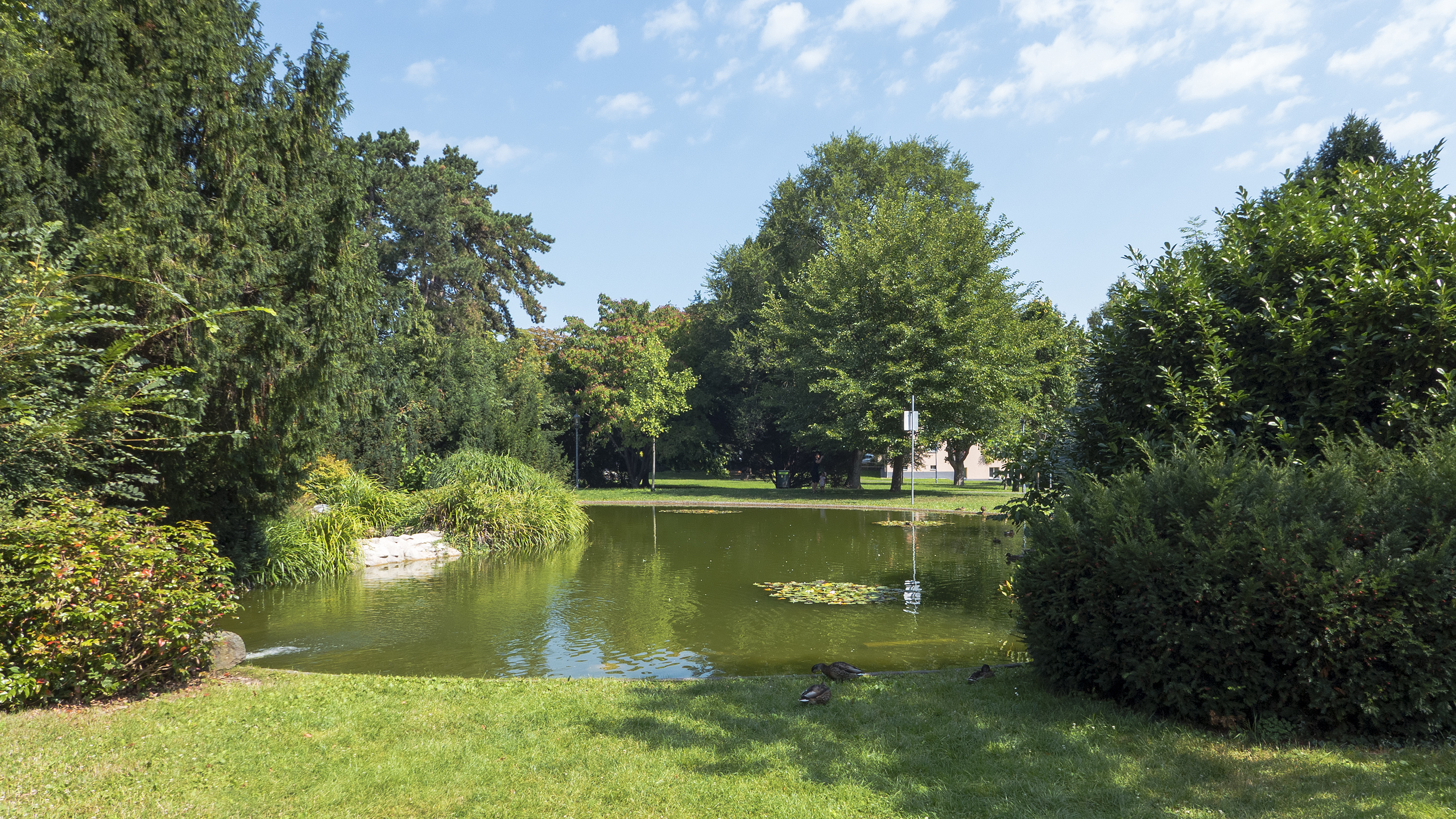 Maurer Rathauspark in Wien 23